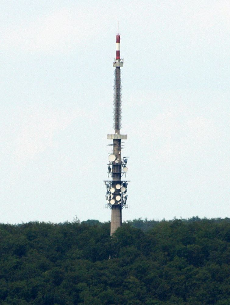 Sender Bamberg (Geisberg)